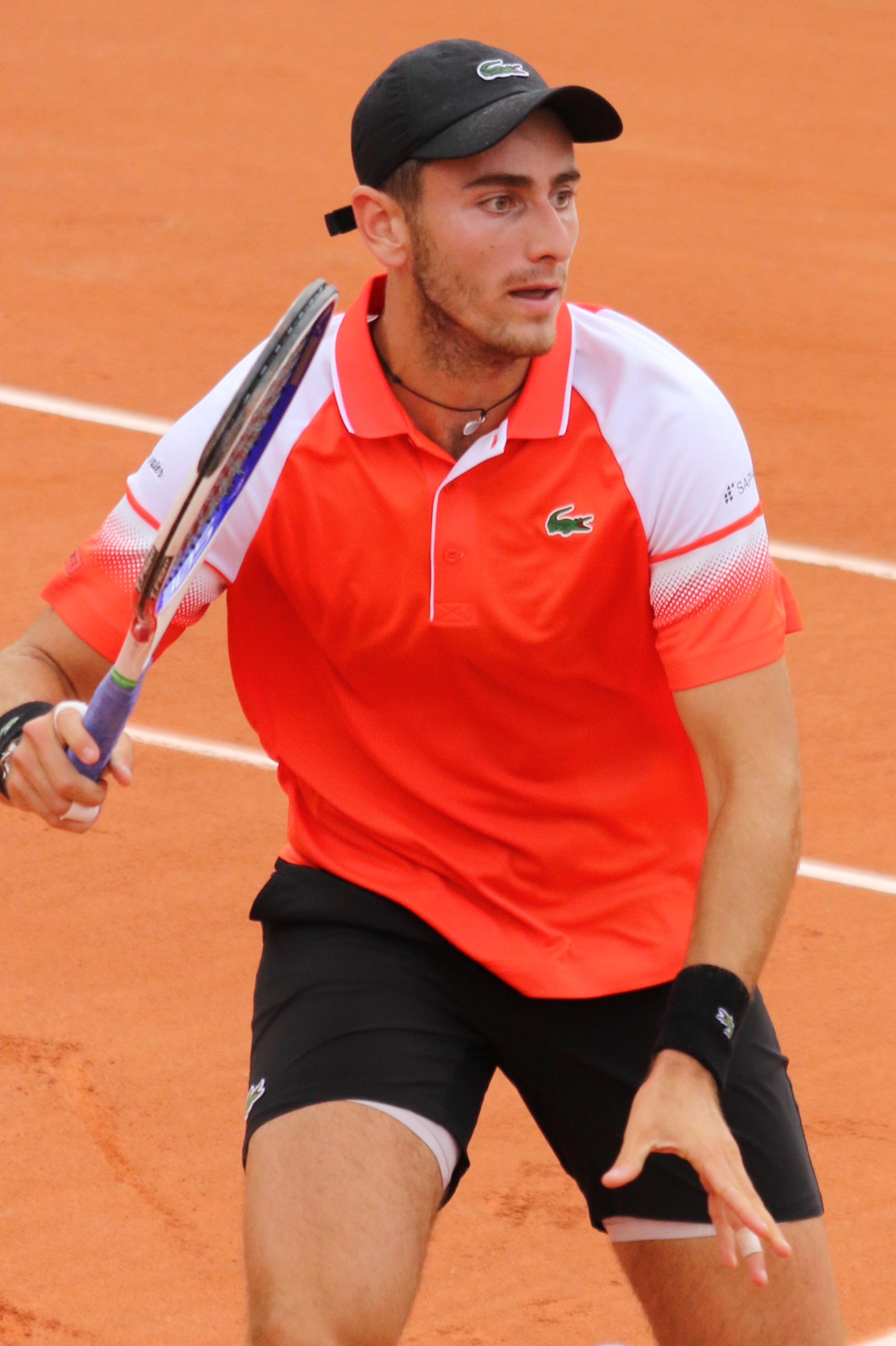 Benchetrit RGQ19 (23)